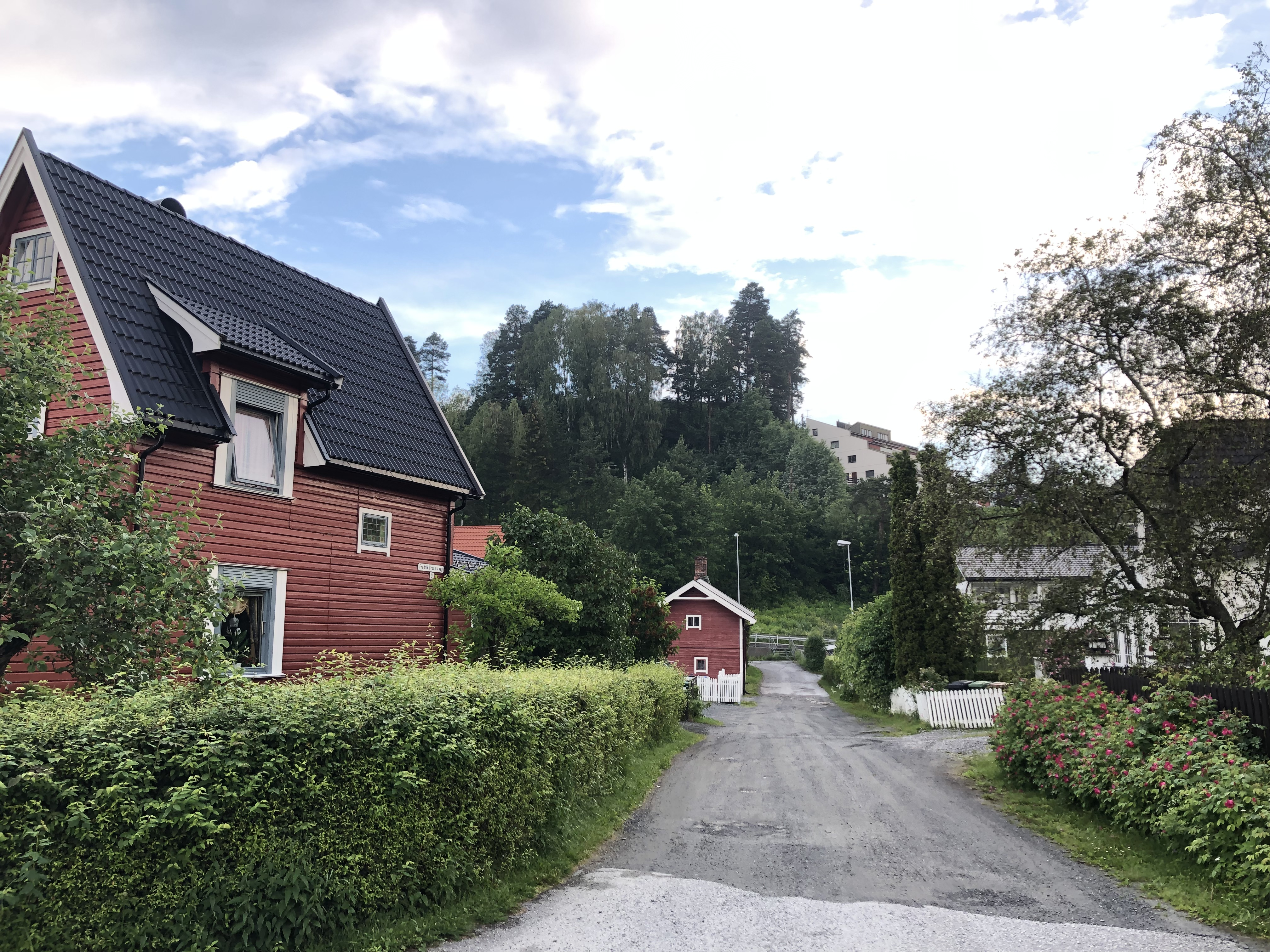 Fredrik Brocks vei i Hønefoss.